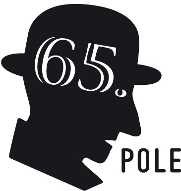 Logo Nakladatelství 65. pole